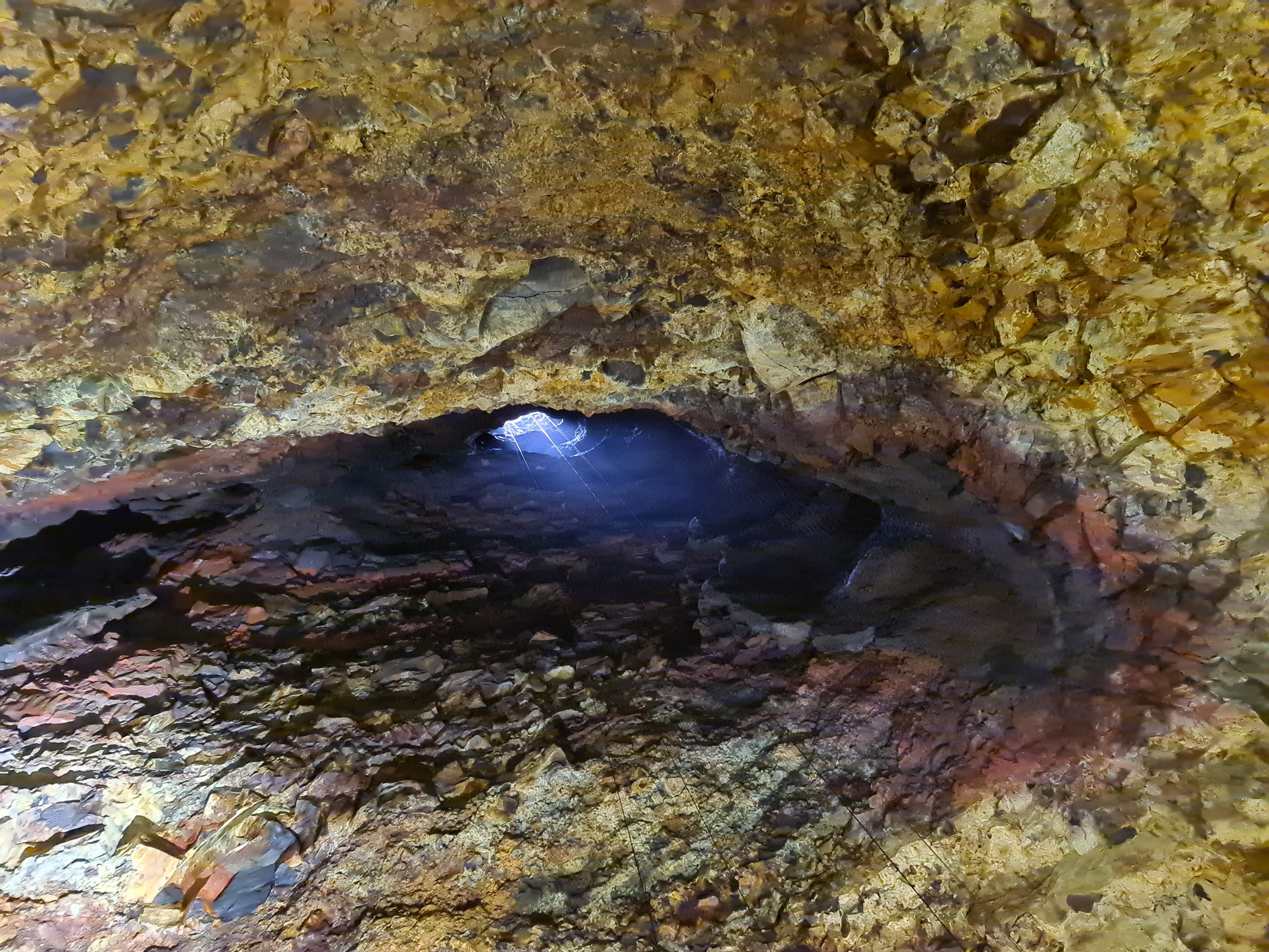 Þríhnúkagígur